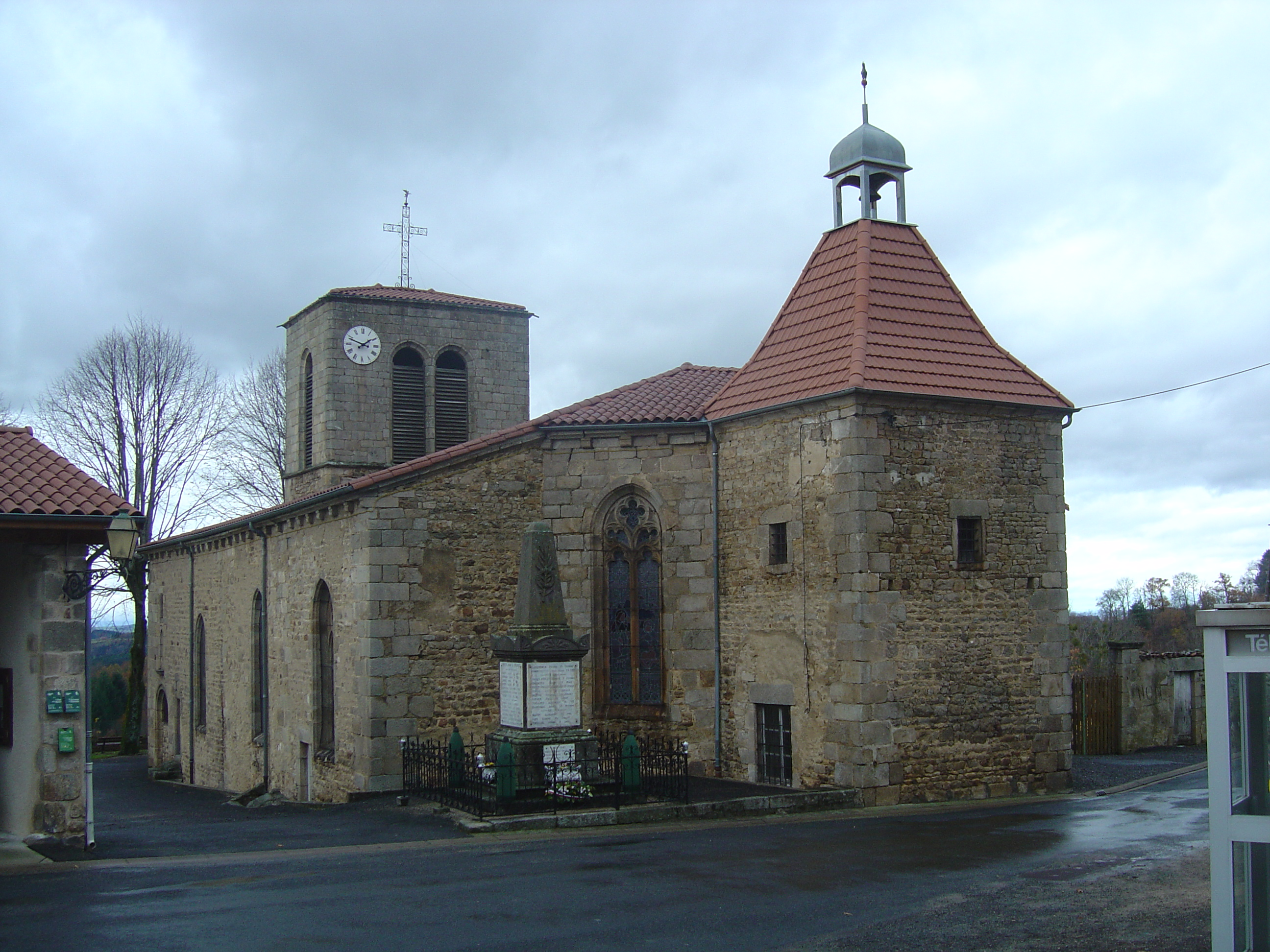 Eglise romane Saint-Jean Baptiste à Olmet